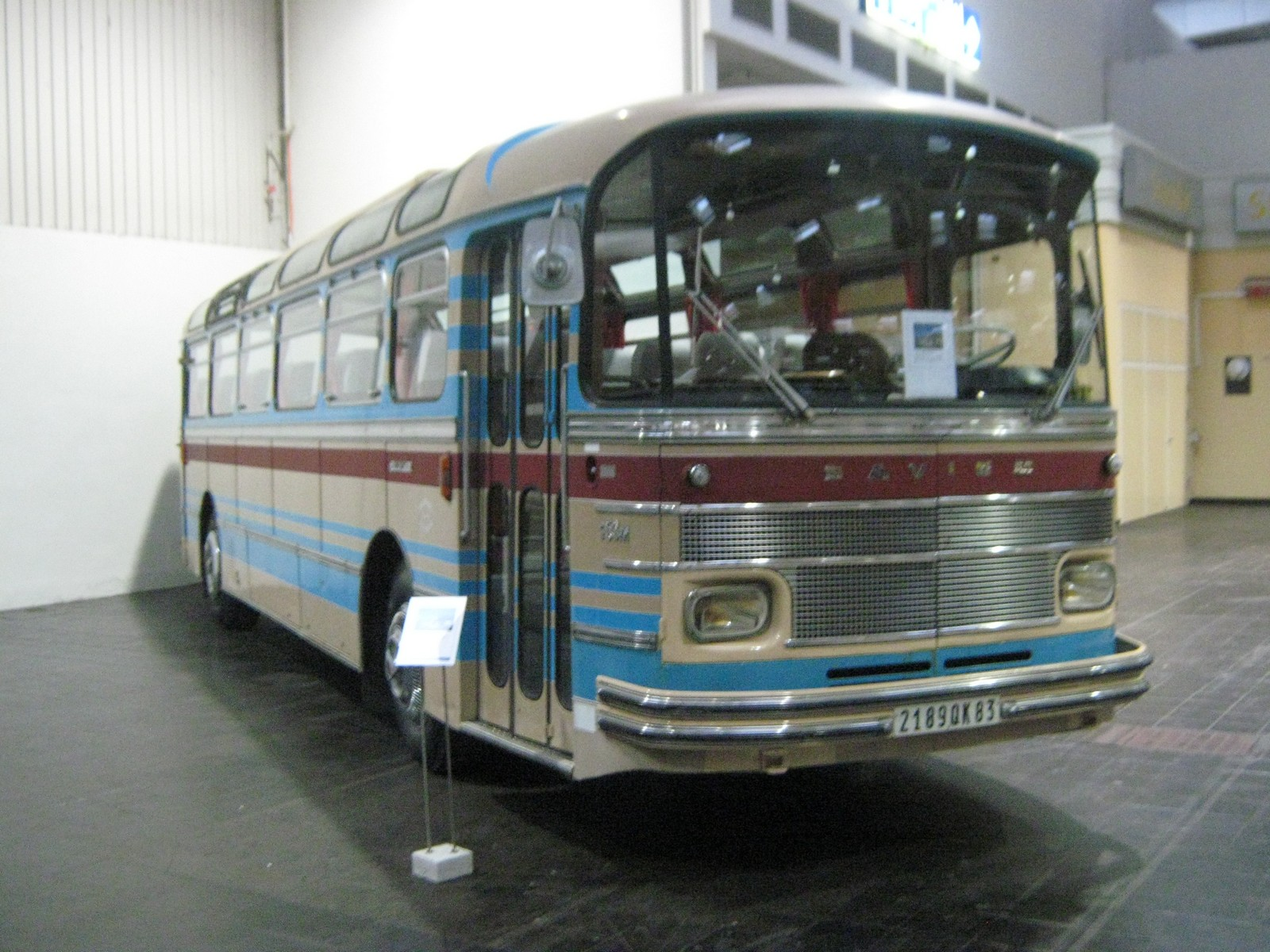 Internationale Automobilausstellung für Nutzfahrzeuge in Hannover 2010